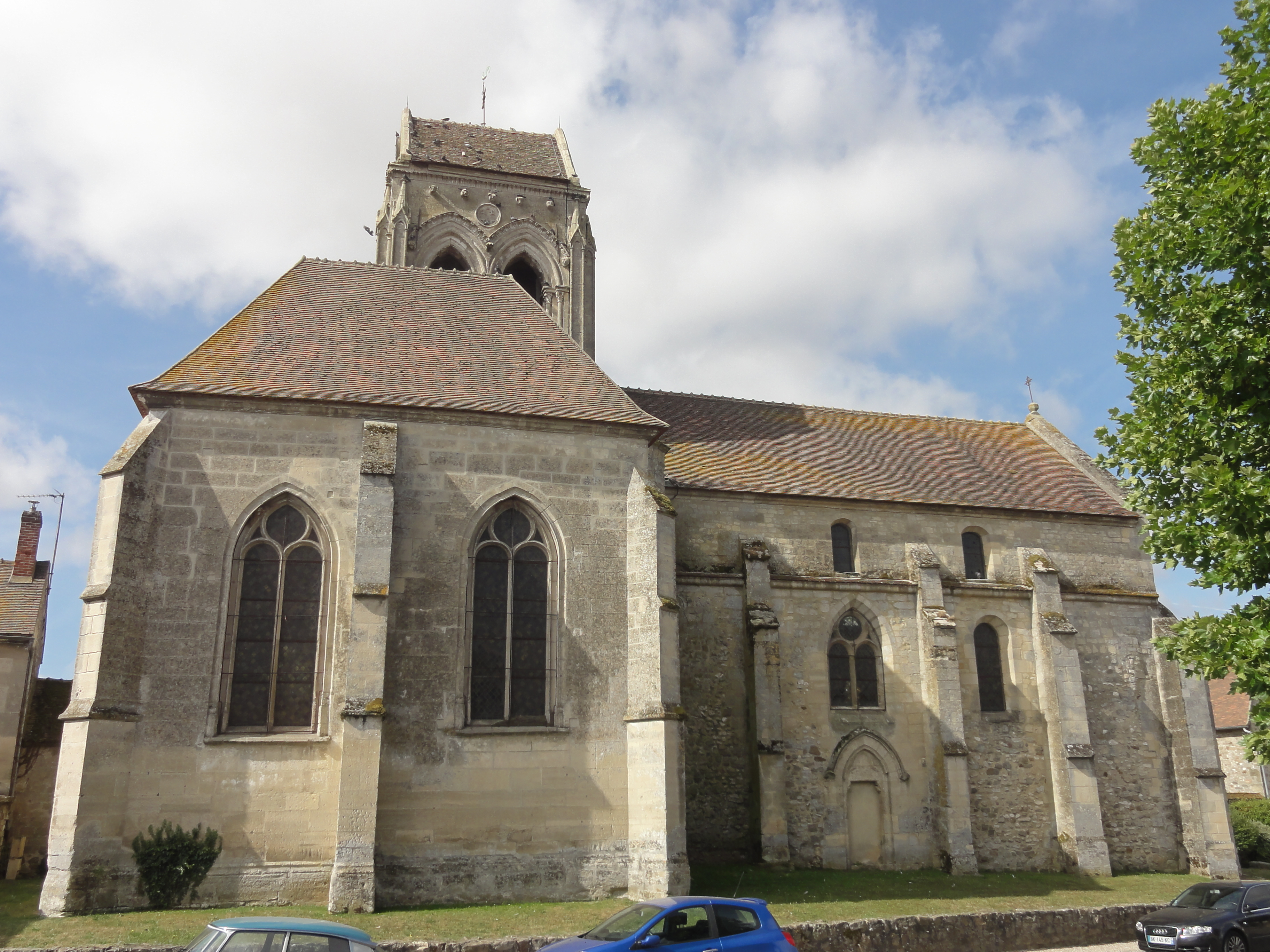 Église Sainte-Marie-Madeleine du Bellay-en-Vexin (voir titre).